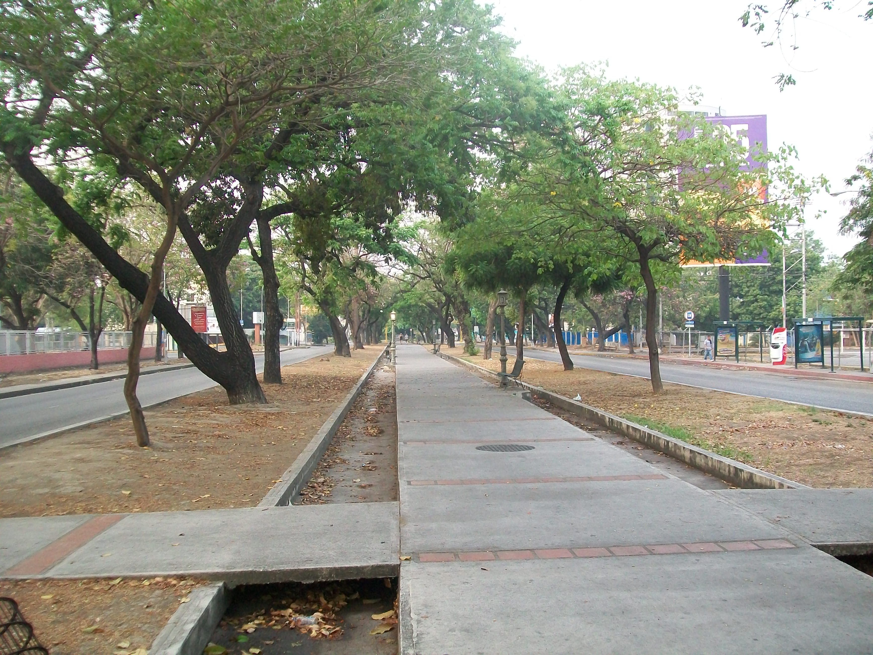 Ave Las Delicias, Maracay. Venezuela.